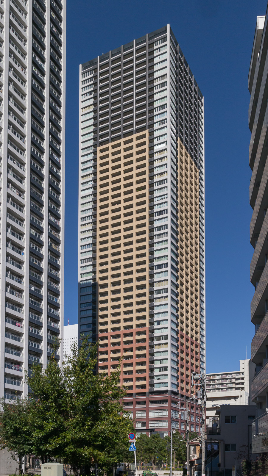 アウルタワー、東京都豊島区東池袋。